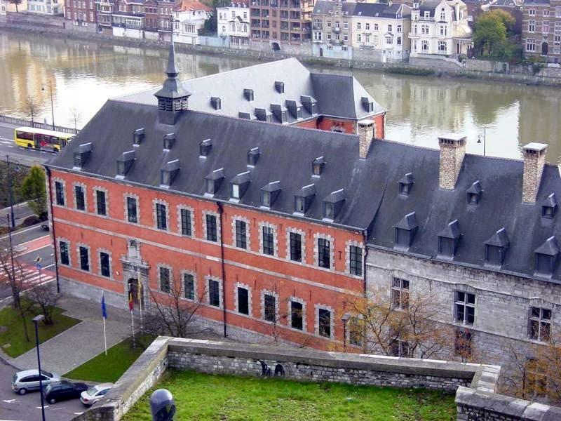 Photo prise par : Stéphane Dohet